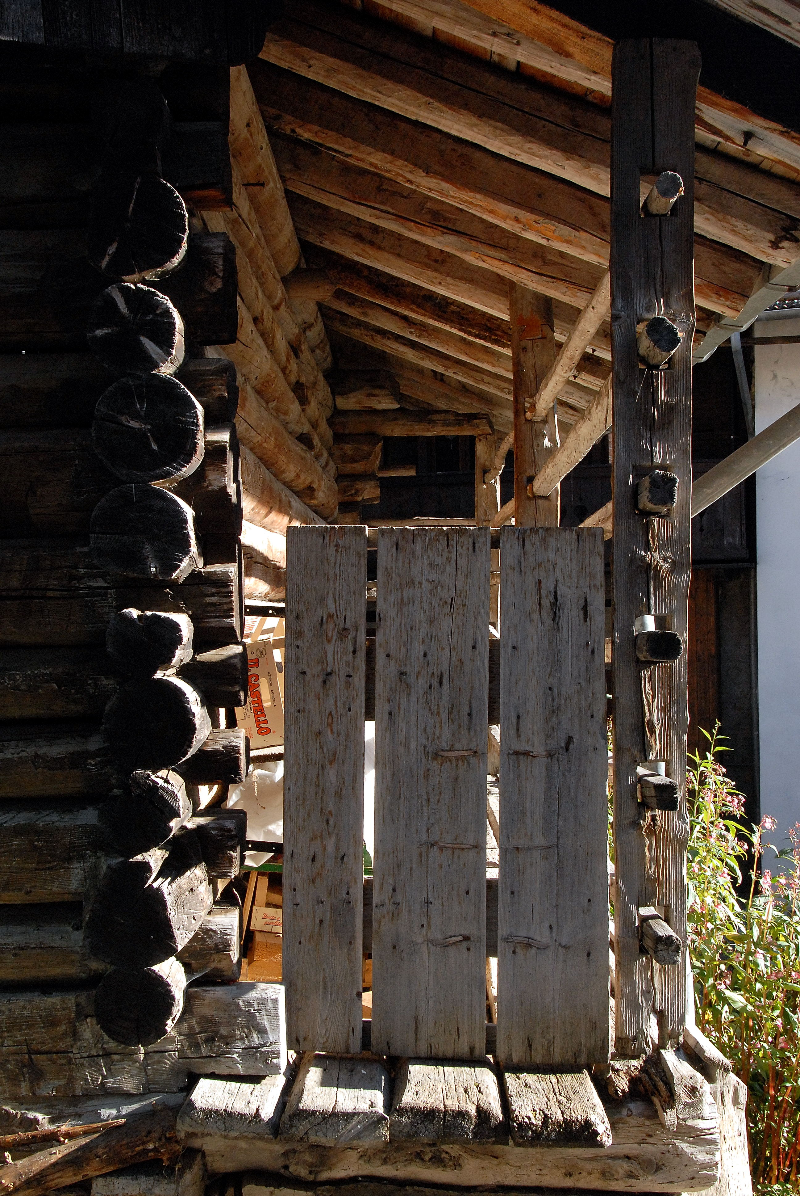 Architecture detail at Sauris di sopra in the community Sauris, region Friuli Venezia-Giulia, Italy